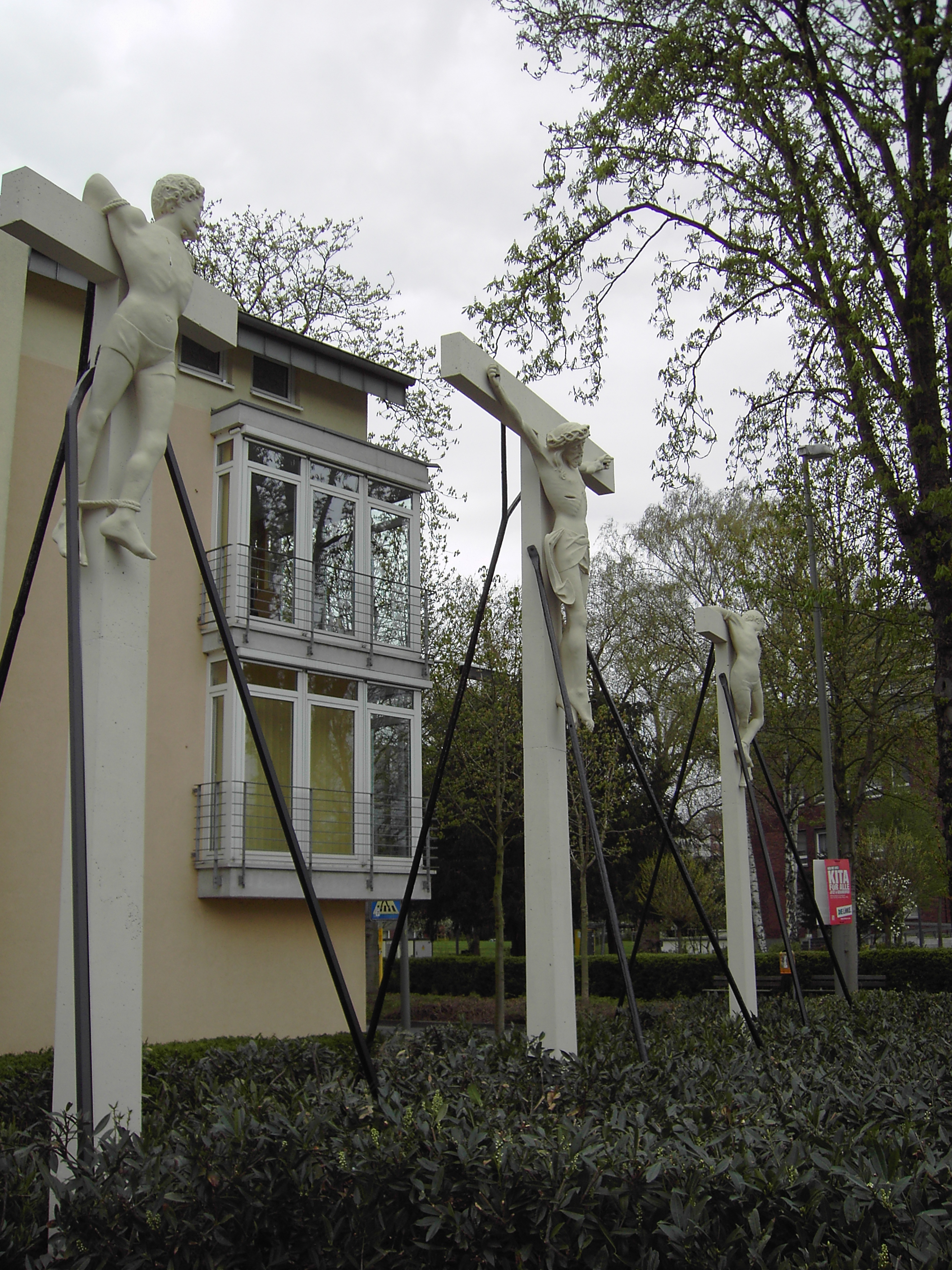 Die Kopien der Kreuze stehen vor dem Walsumer Tor und an der Duisburger Straße in der Nähe des Evangelischen Krankenhauses.Die Originale befinden sich heute an der Nordseite des Turms der katholischen Kirche St. Vincentiuskirche.